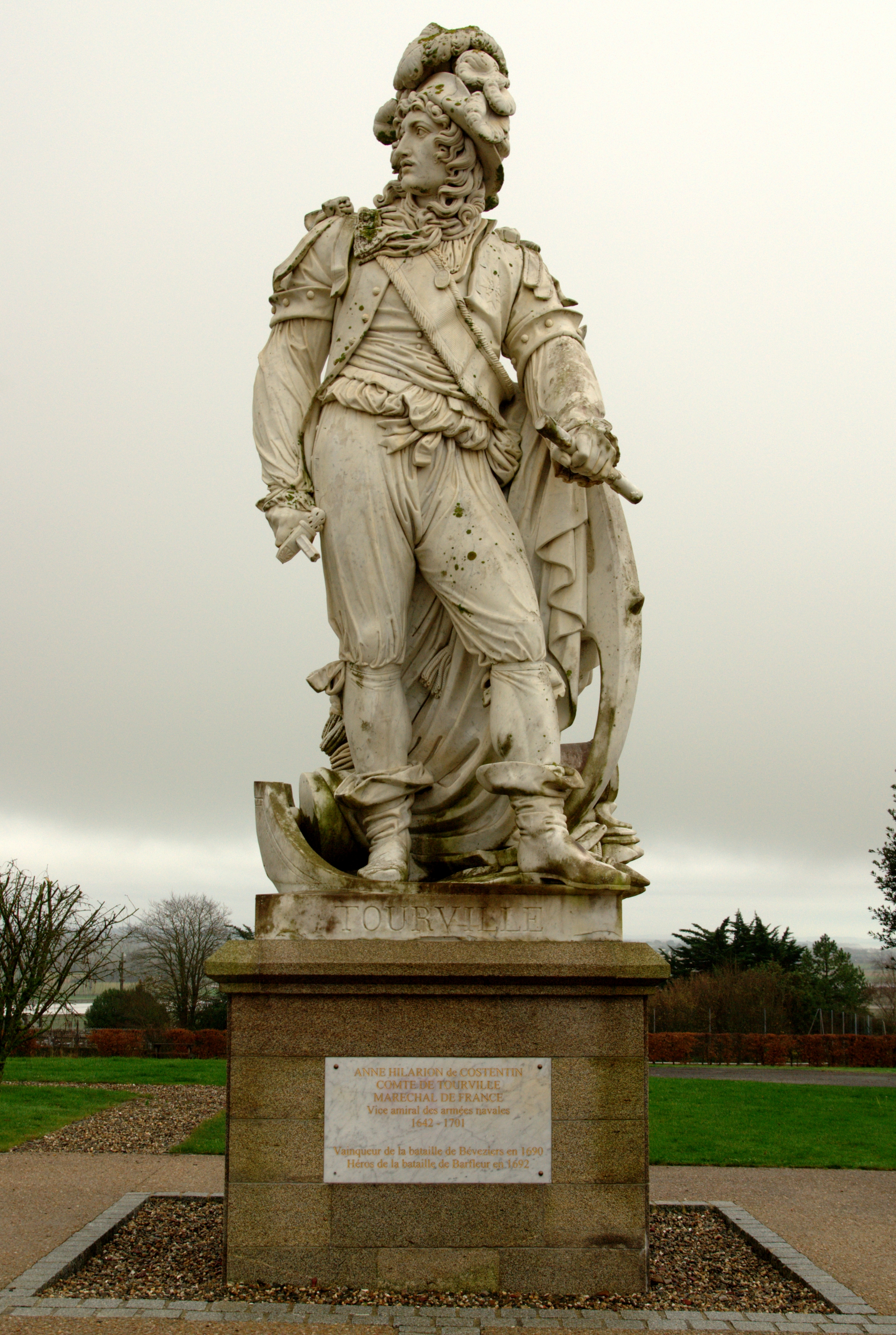 Sur la place du village de Tourville-sur-Sienne (50) la statue du Maréchal de France Anne-Hilarion-de-Costentin, Comte de Tourville; Vice-Amiral des armées navales (1642-1701). Tourville, l'épée d'amiral dans la main droite, s'appuye sur une ancre de vaisseau. Derrière lui sont des trophées rappelant le bombardement d'Alger et la victoire navale de 1690 contre la flotte Anglo-Hollandaise.